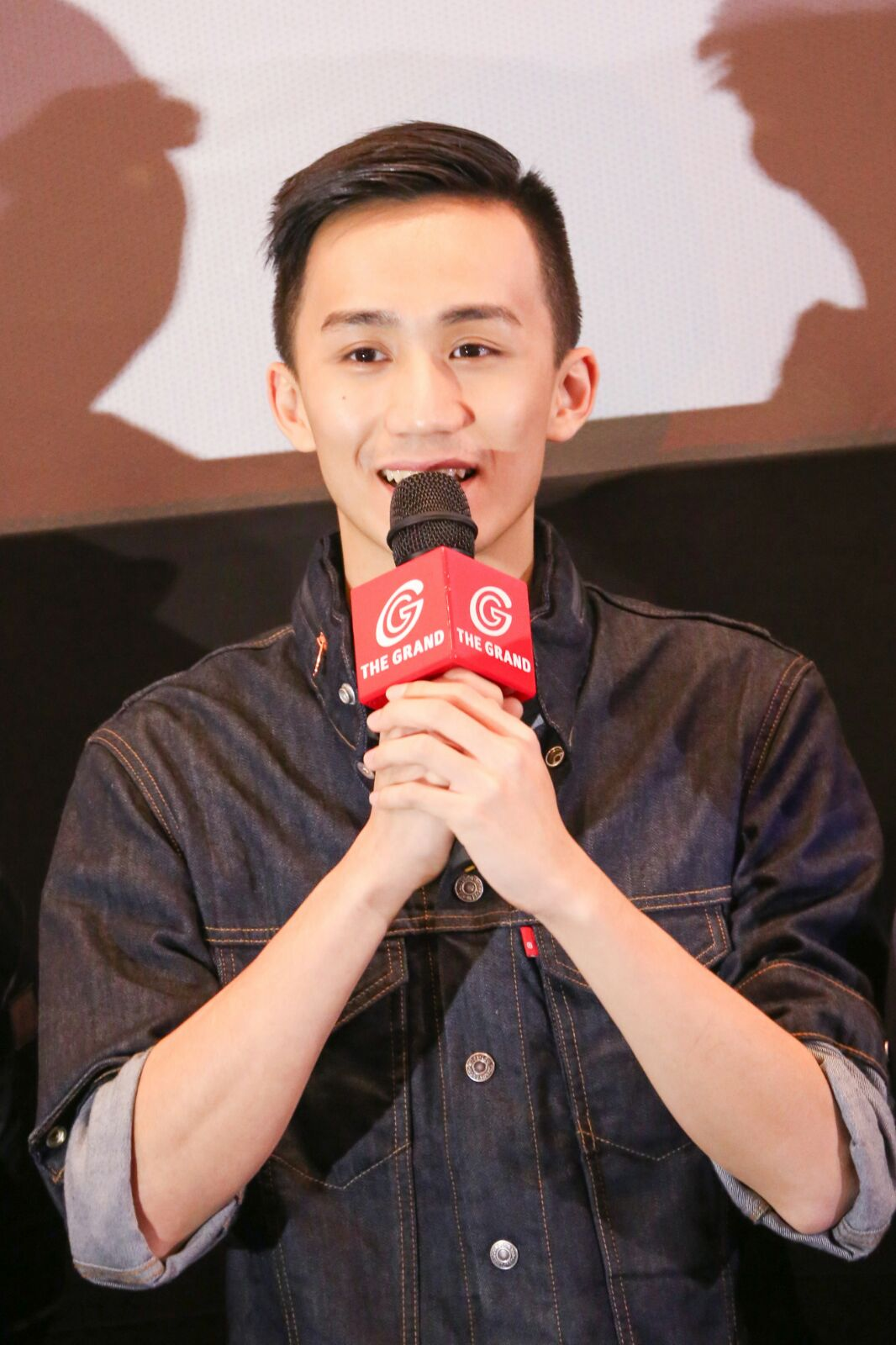 吳肇軒於圓方謝票(2015.11.29)